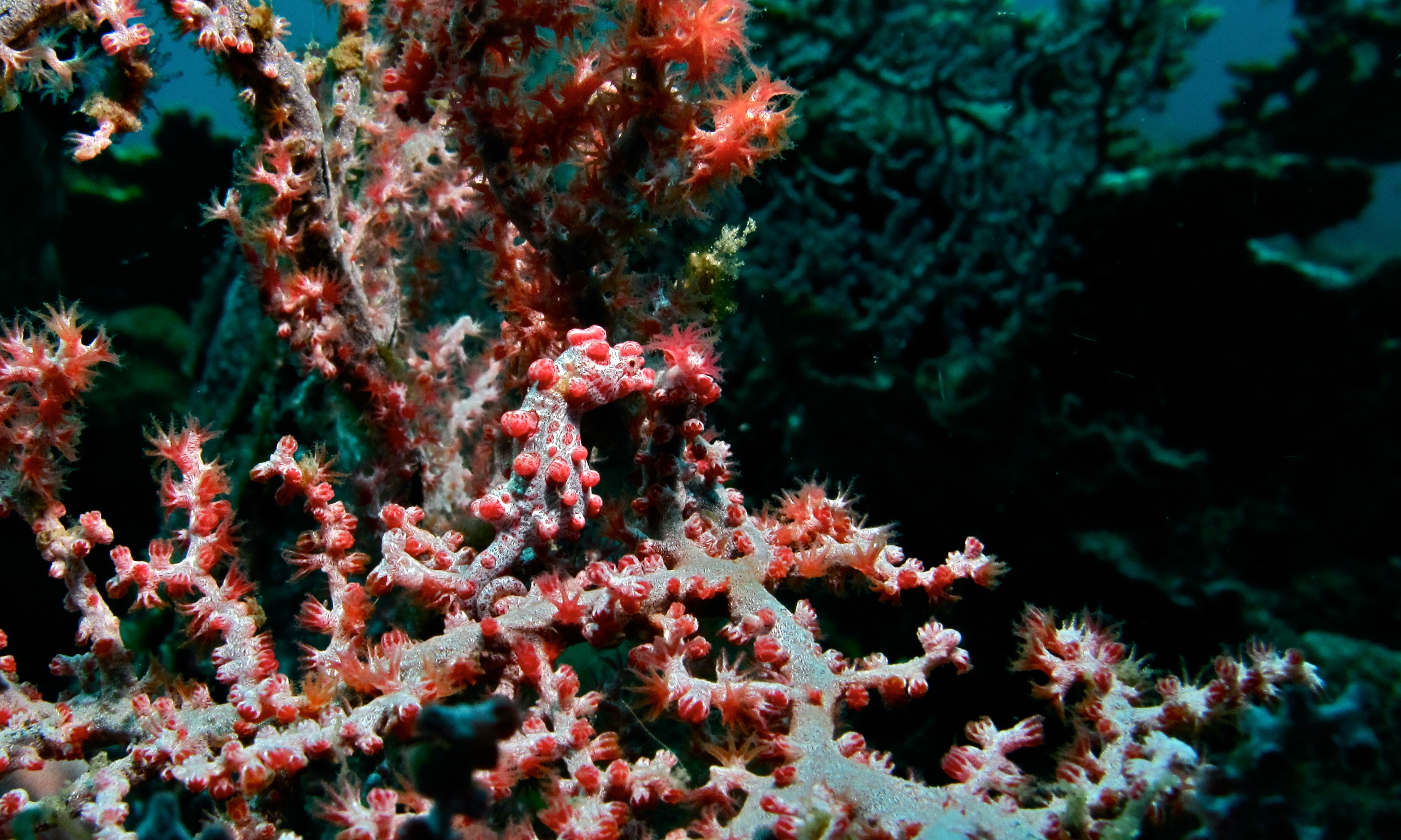 Nudi Retreat, Lembeh Strait, Sulawesi, INDONESIA